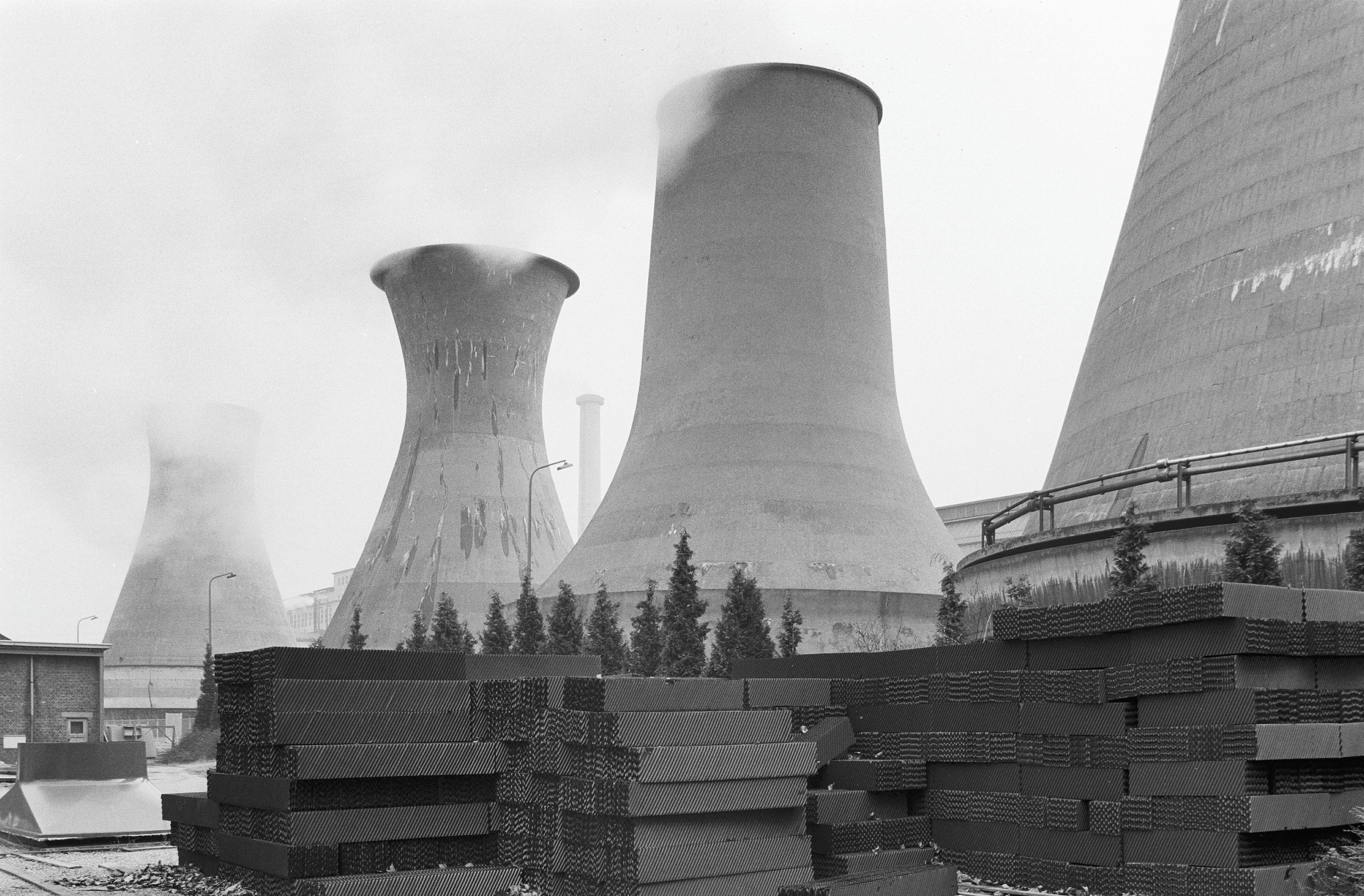 koeltorens op mijnterrein "Emma"